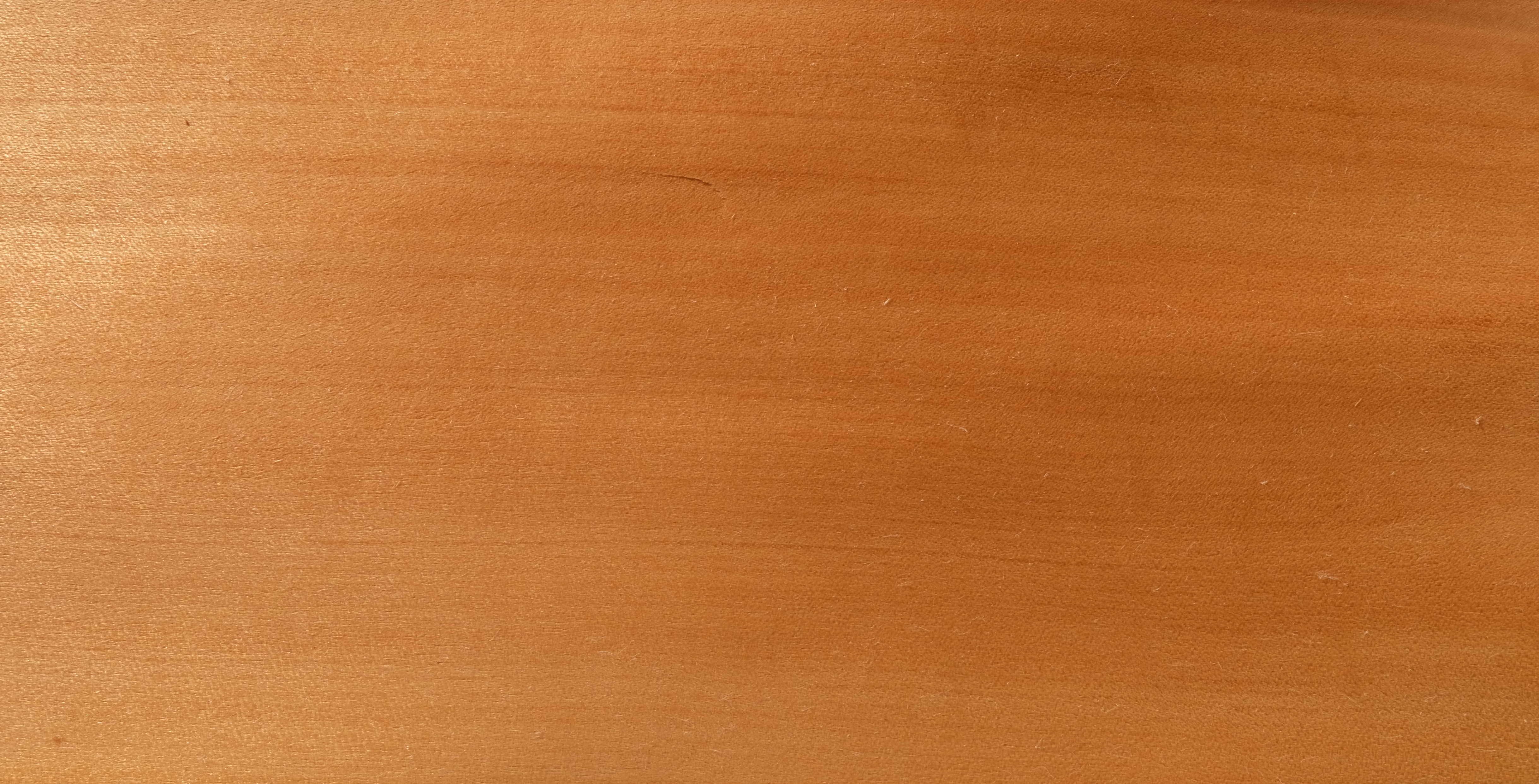 gemessertes Furnier des Amerikanischen Amberbaums, geölt, nicht geschliffen